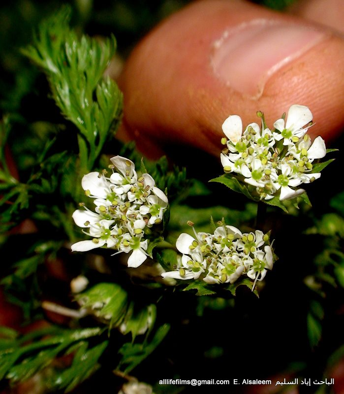 زهر الحرتمنة